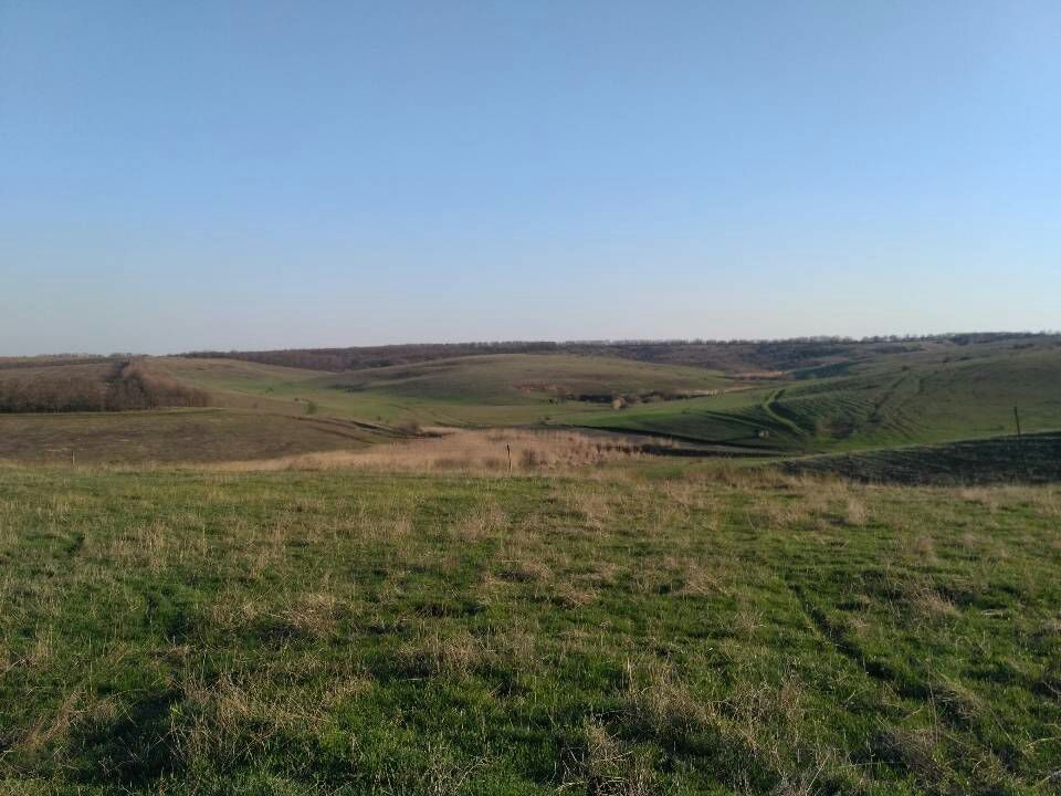 Весна в селе Никольском